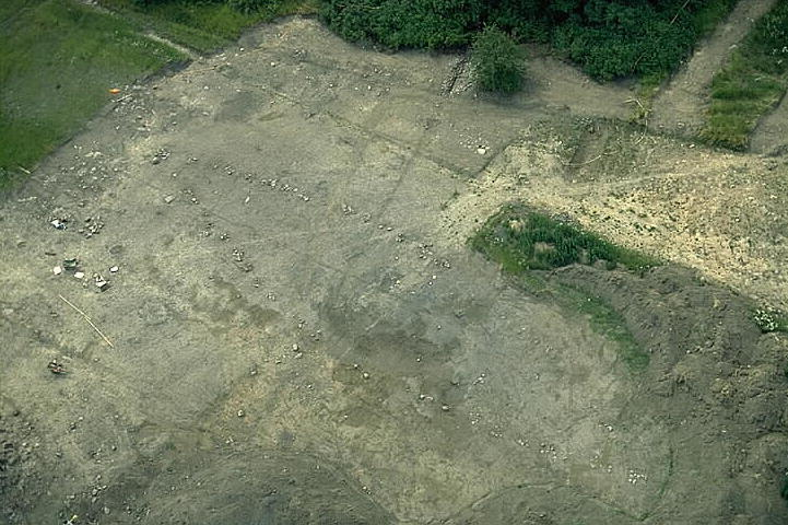 Arkeologisk undersökning, en skeppssättning i bildens mitt. Motiv: Gumpekulla Nyckelord: Flygbilder, Riksintressen Kategori: Arkeologisk undersökning, Stenkrets/domarring/skeppssättningArkeologisk undersökning, en skeppssättning i bildens mitt.